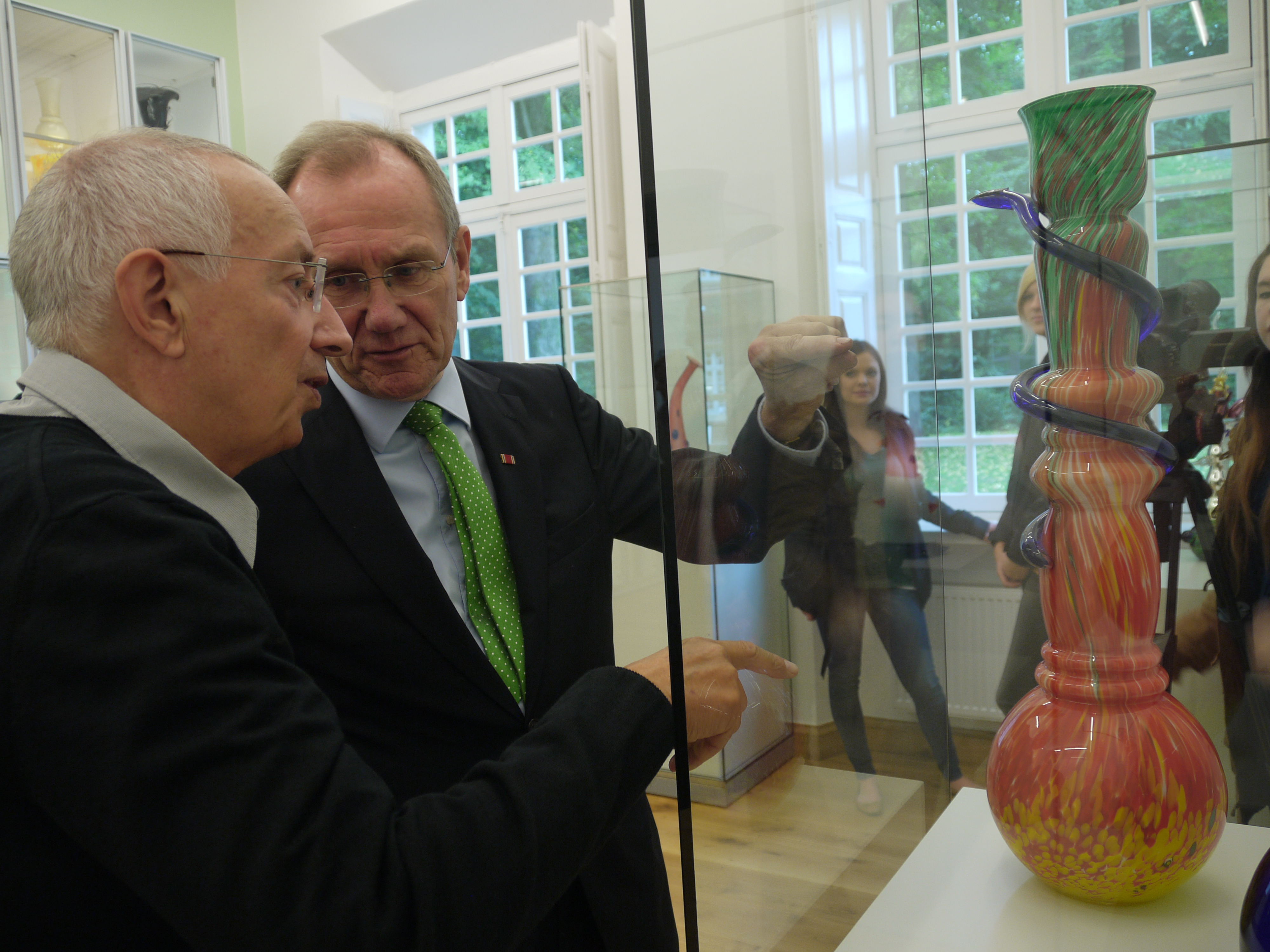 Wolfgang Pohl im Gespräch mit dem Vorsitzenden des Emsländischen Heimatbundes Hermann Bröring.